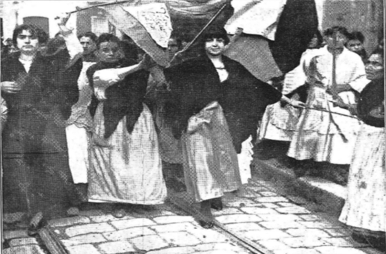 Manifestación de las Faeneras en Málaga 1918. Foto publicada en "La Unión ilustrada". Catálogo de la Biblioteca Nacional de España.